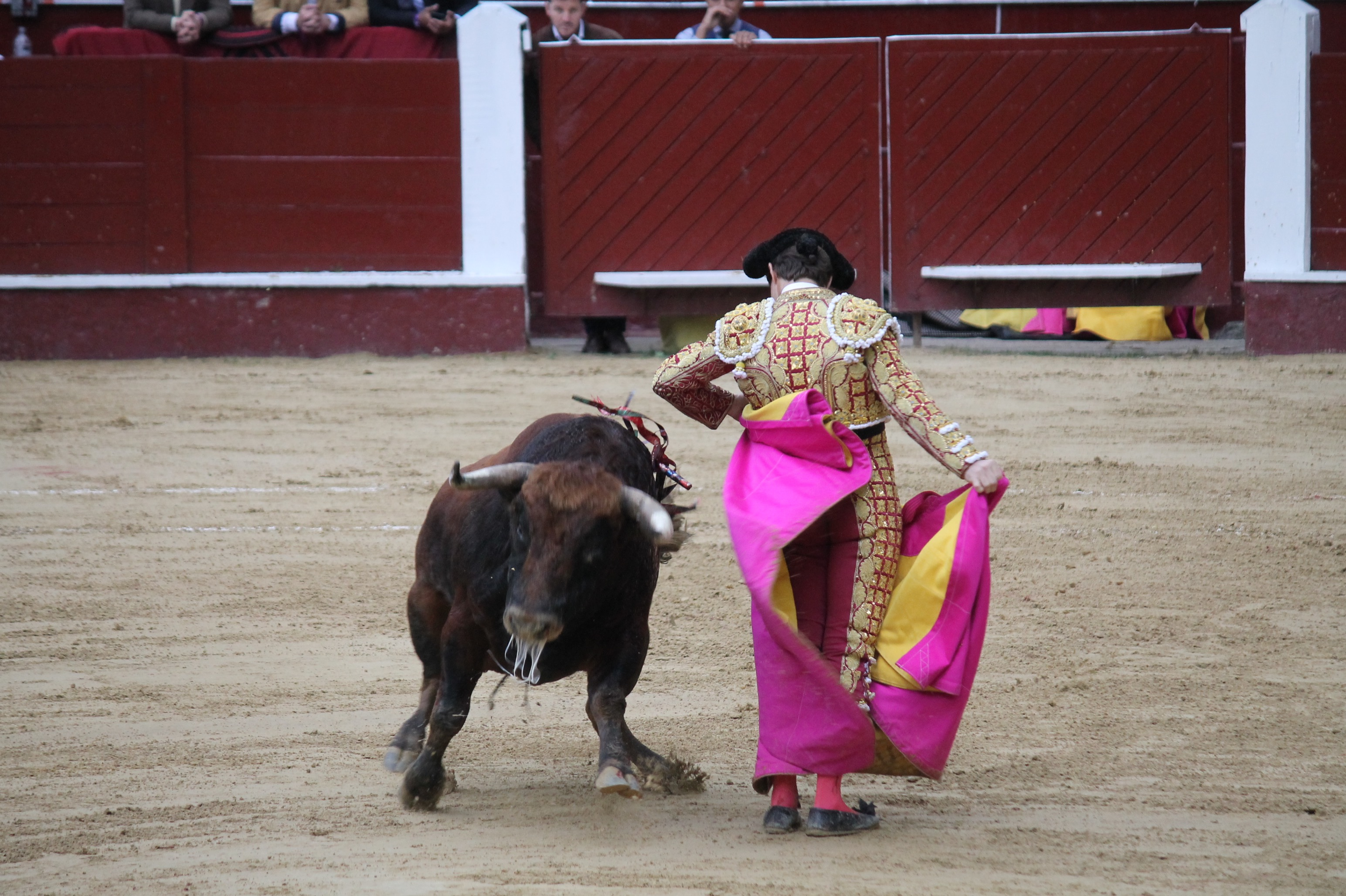 Chicualeina de Julián López en Bogotá en 2018